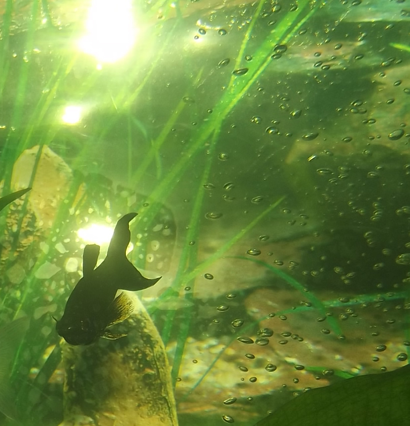 Napowietrzanie (aerracja) w akwarium